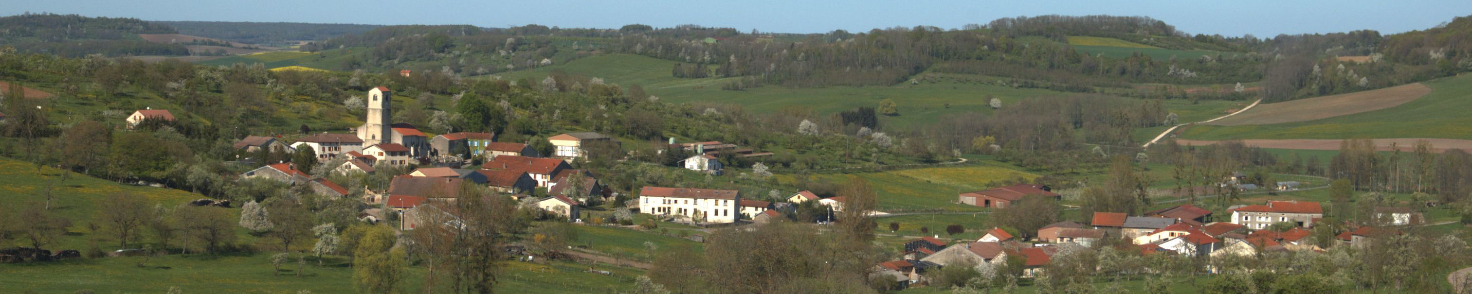 Gugney-aux-Aulx - Vue panoramique depuis "La Chapelle" CD 10 Châtel-sur-Moselle - Mirecourt